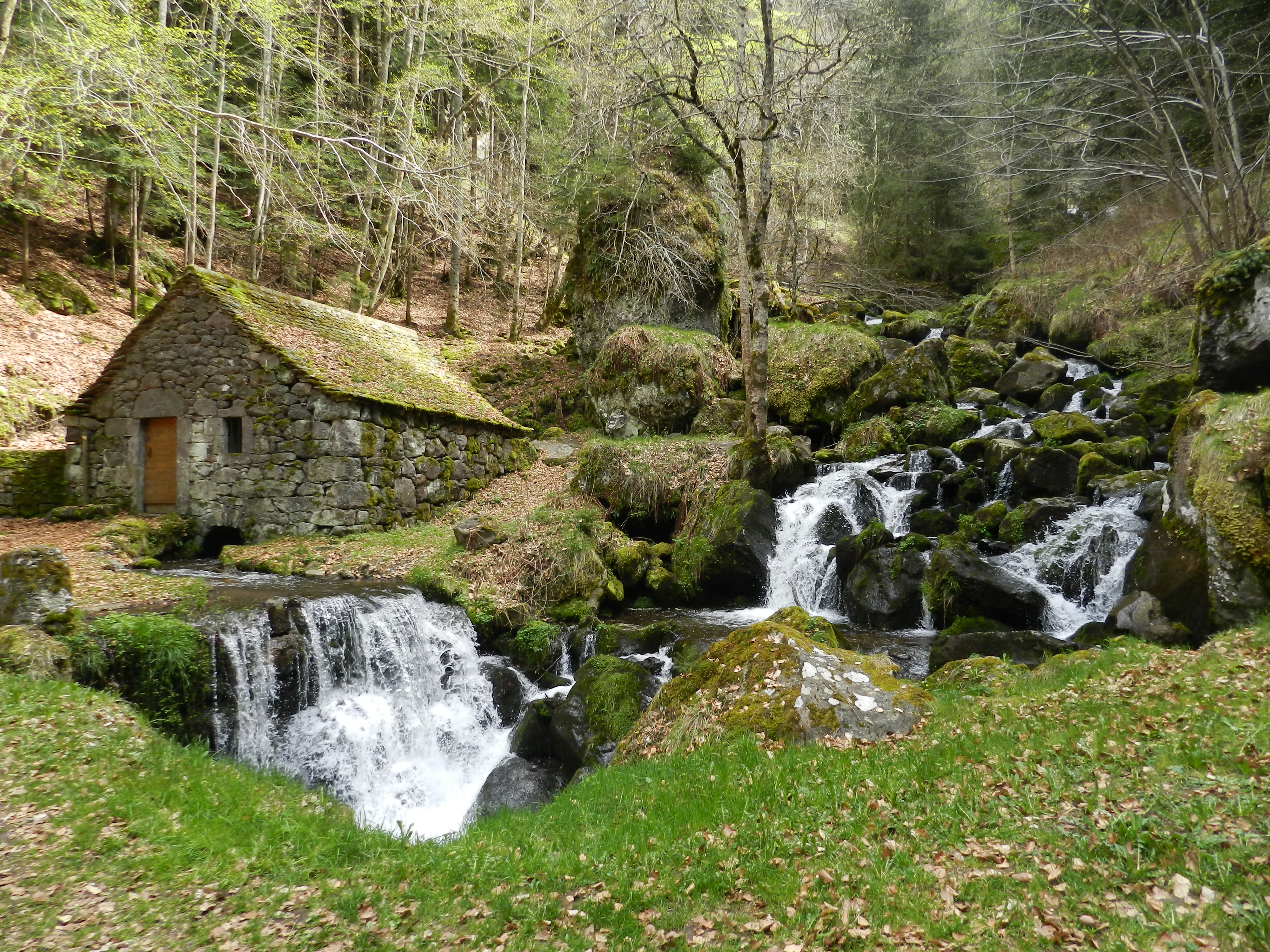 Le moulin de Chambeuil, sur la commune de Laveissière, datant de 1811. Le ruisseau du même nom le traversant, se caractérise par de multiples cascades.